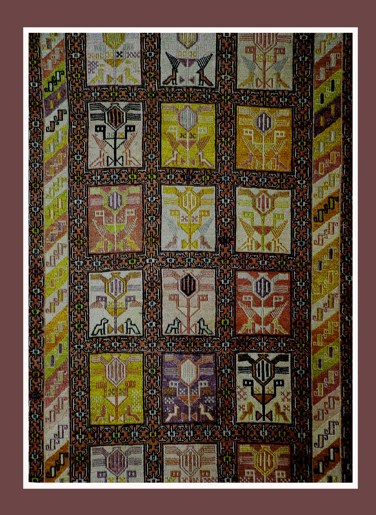 Szumak kilim szőnyegminták, Avanos, Törökország